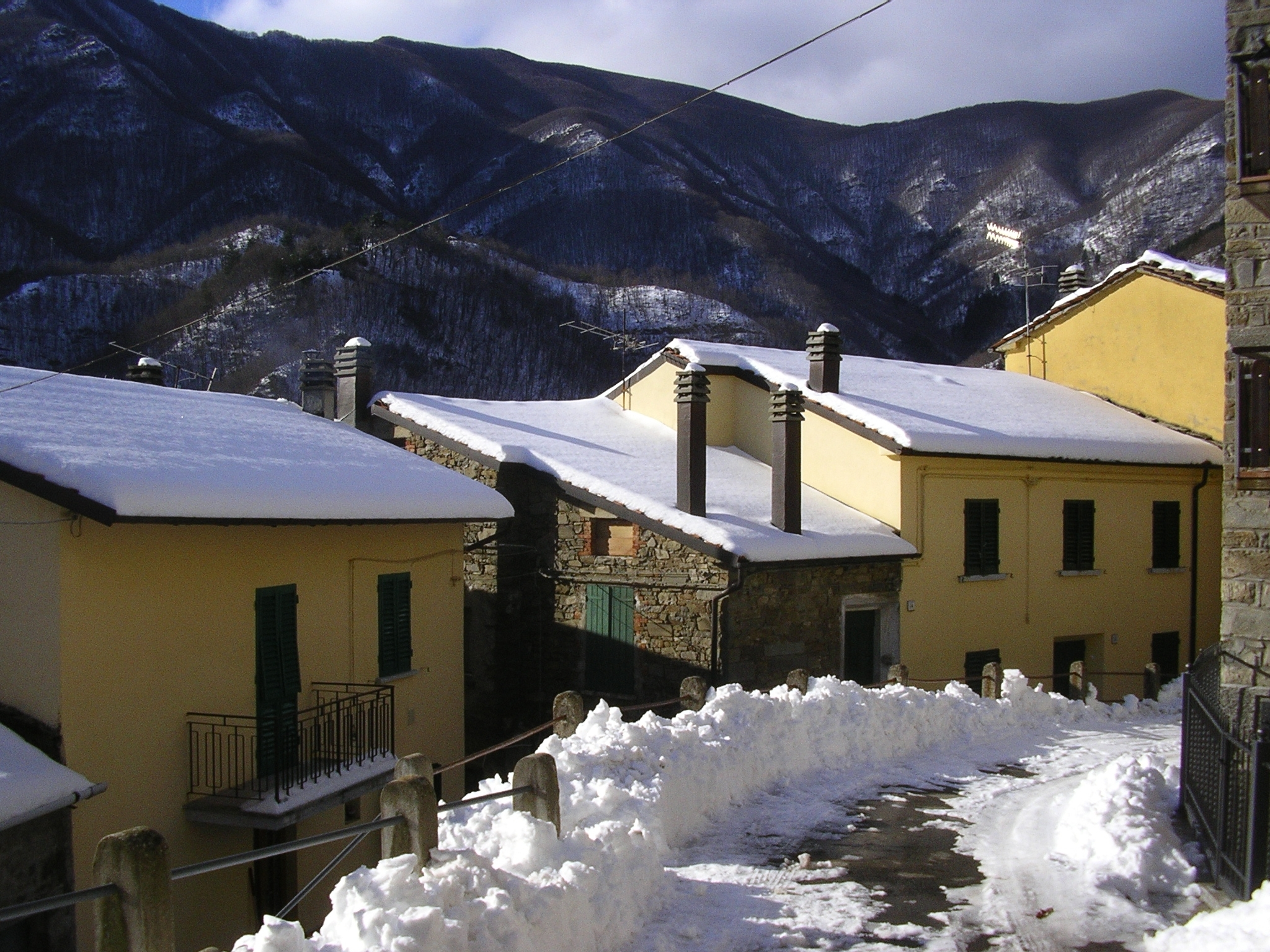 Scorcio di Casa Calistri, frazione del Comune di Granaglione (BO)